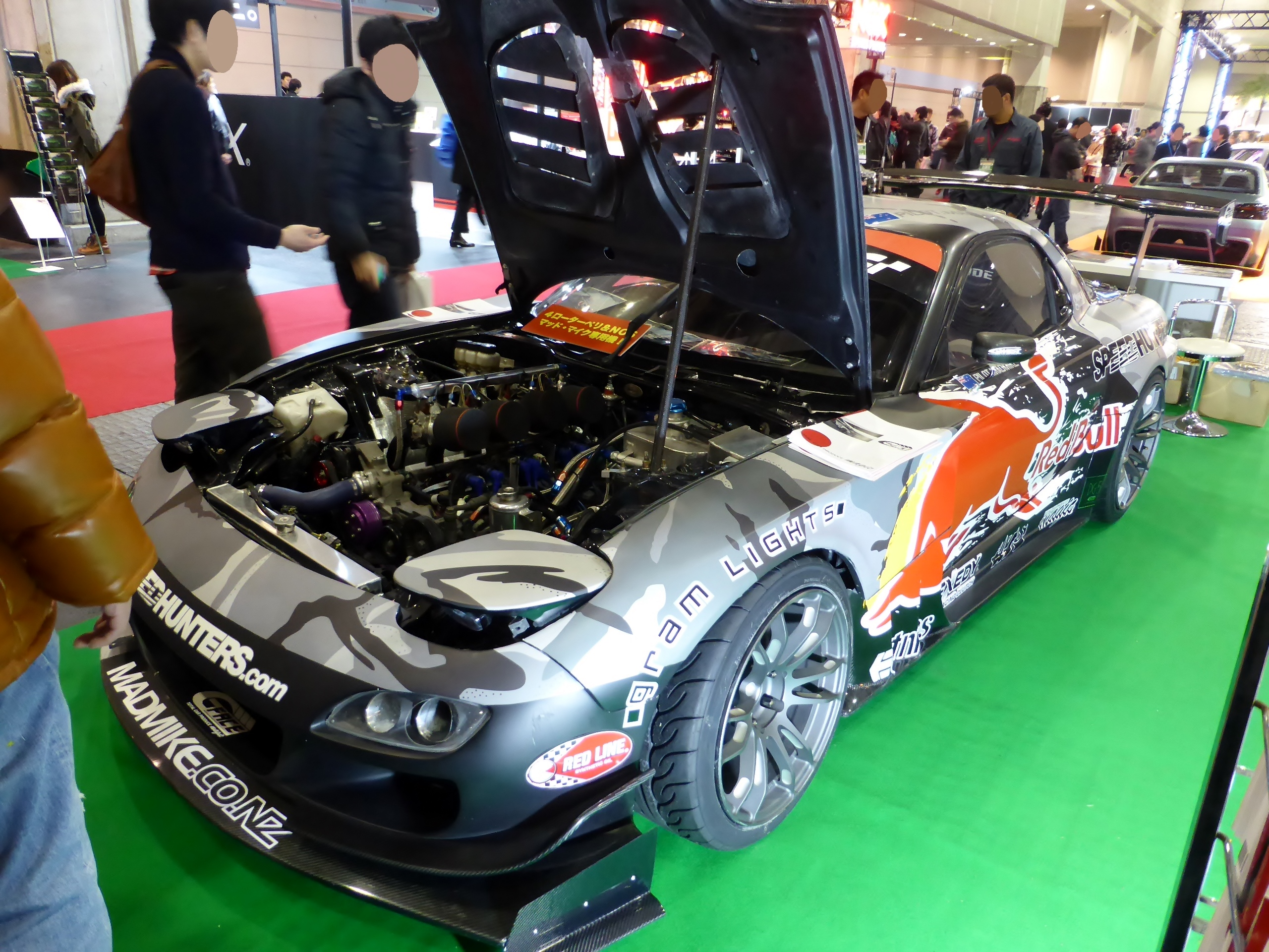 大阪オートメッセ2014においてMadbul RX7を撮影。